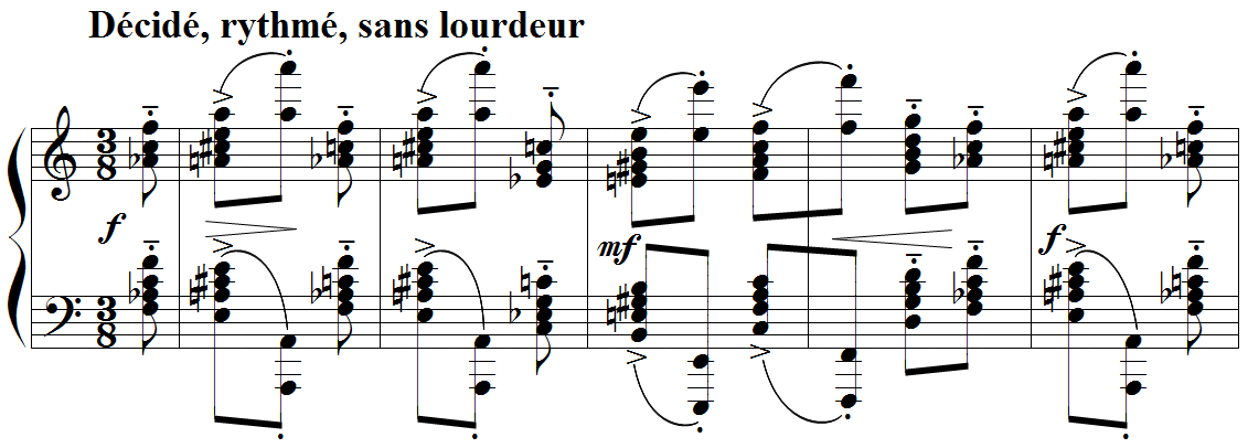 Debussy - Etude "pour les accords", mes.1-5